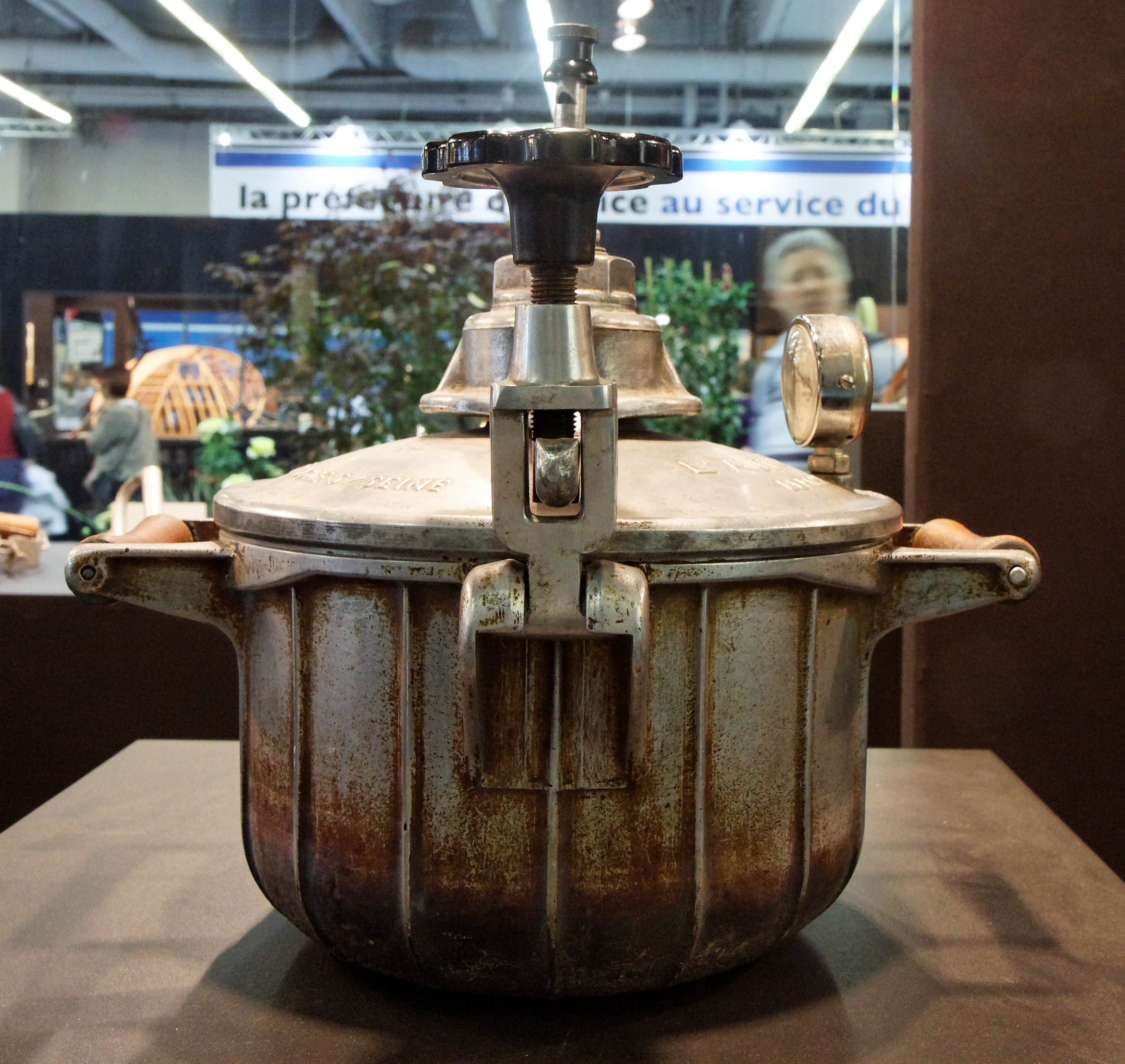 Autocuiseur AutoThermos. Objet primé au concours Lépine de 1911.